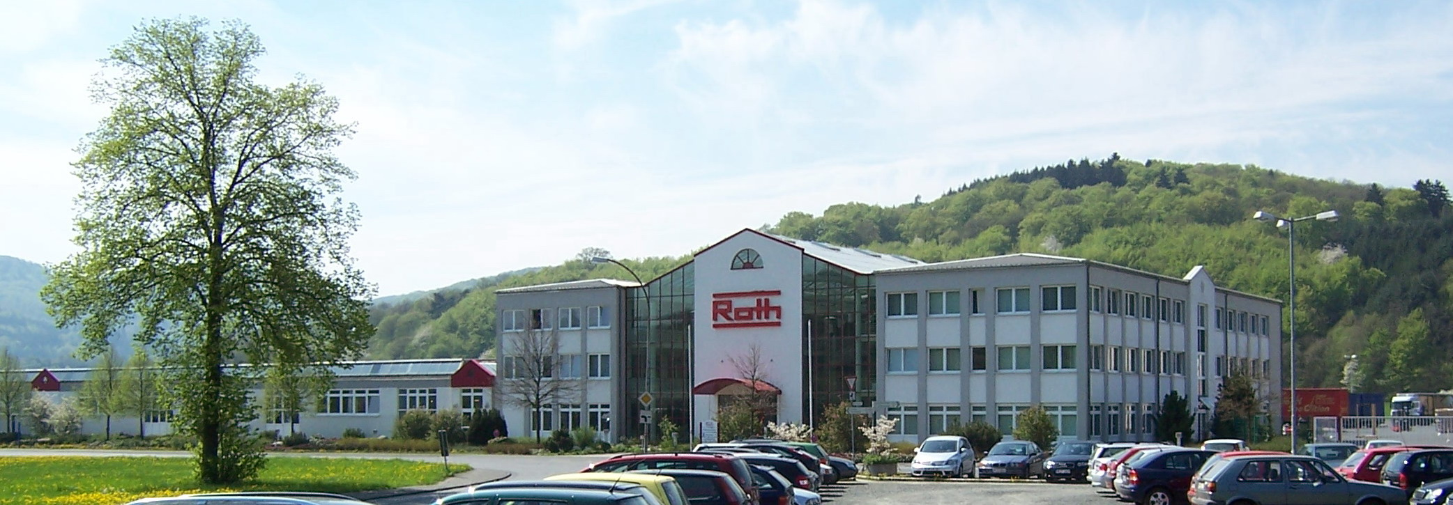 Empfangsgebaeude der Roth-Werke in Buchenau